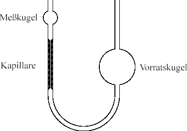 Schema eines Ostwald Viskosimeter